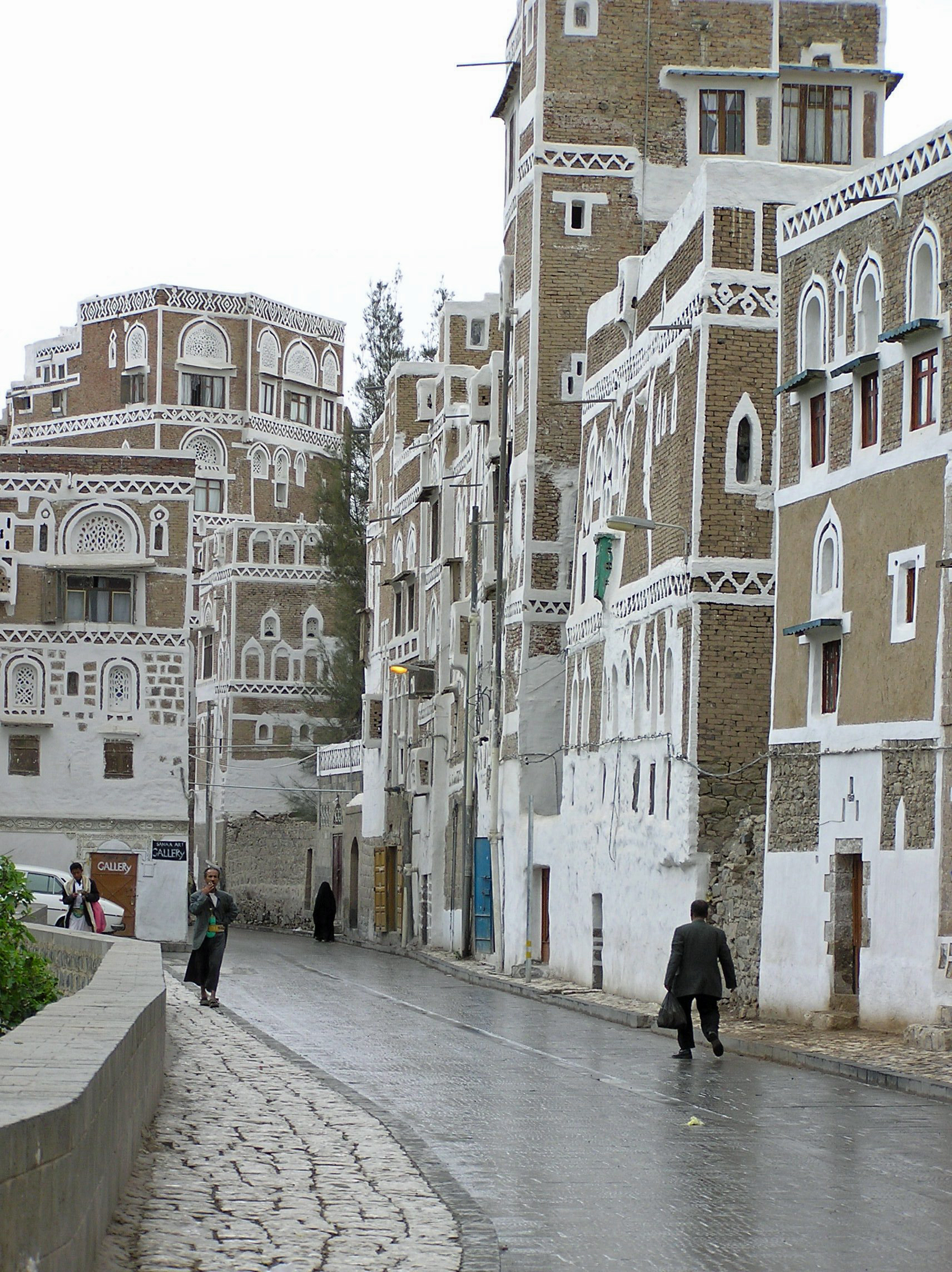 Sana'a un (rare) jour de pluie - Yémen